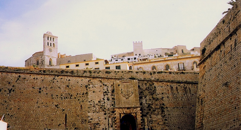 Muralla d´entrada a "Dalt Vila"